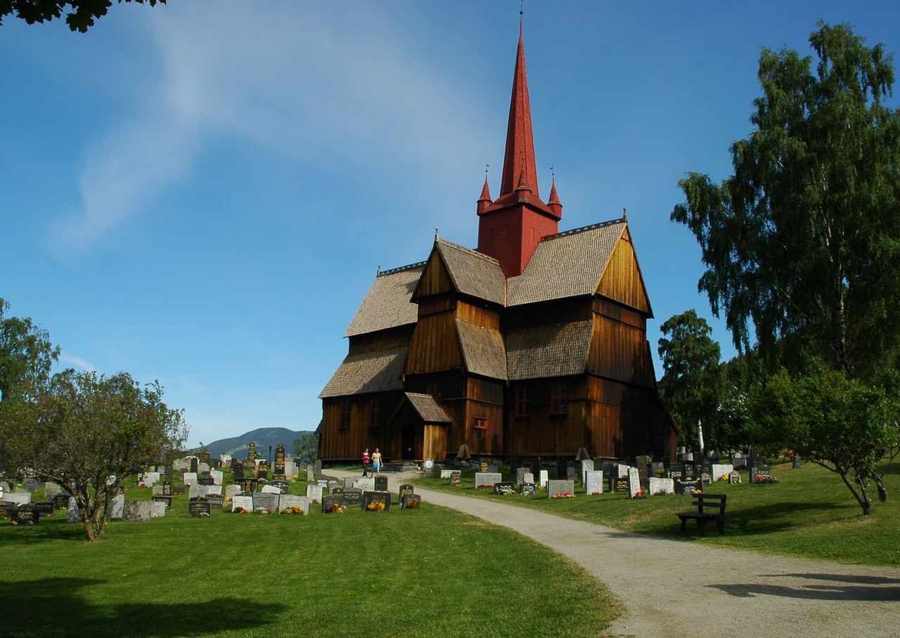 Stavkirke de Ringebu